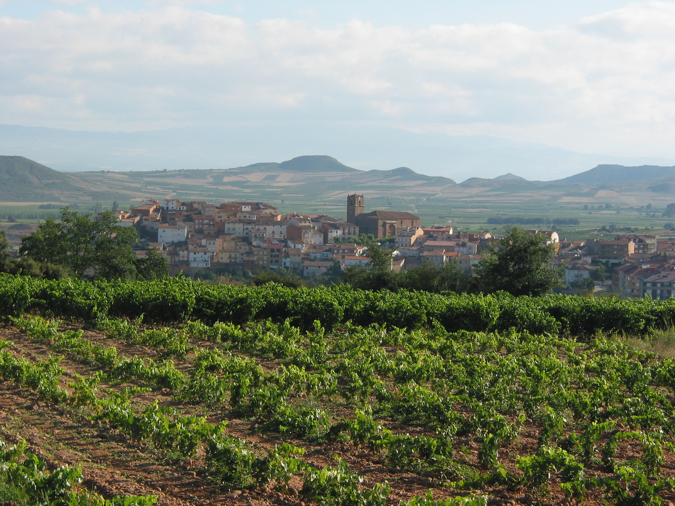 Vista de Entrena desde lo alto del camino del cementerio nuevo